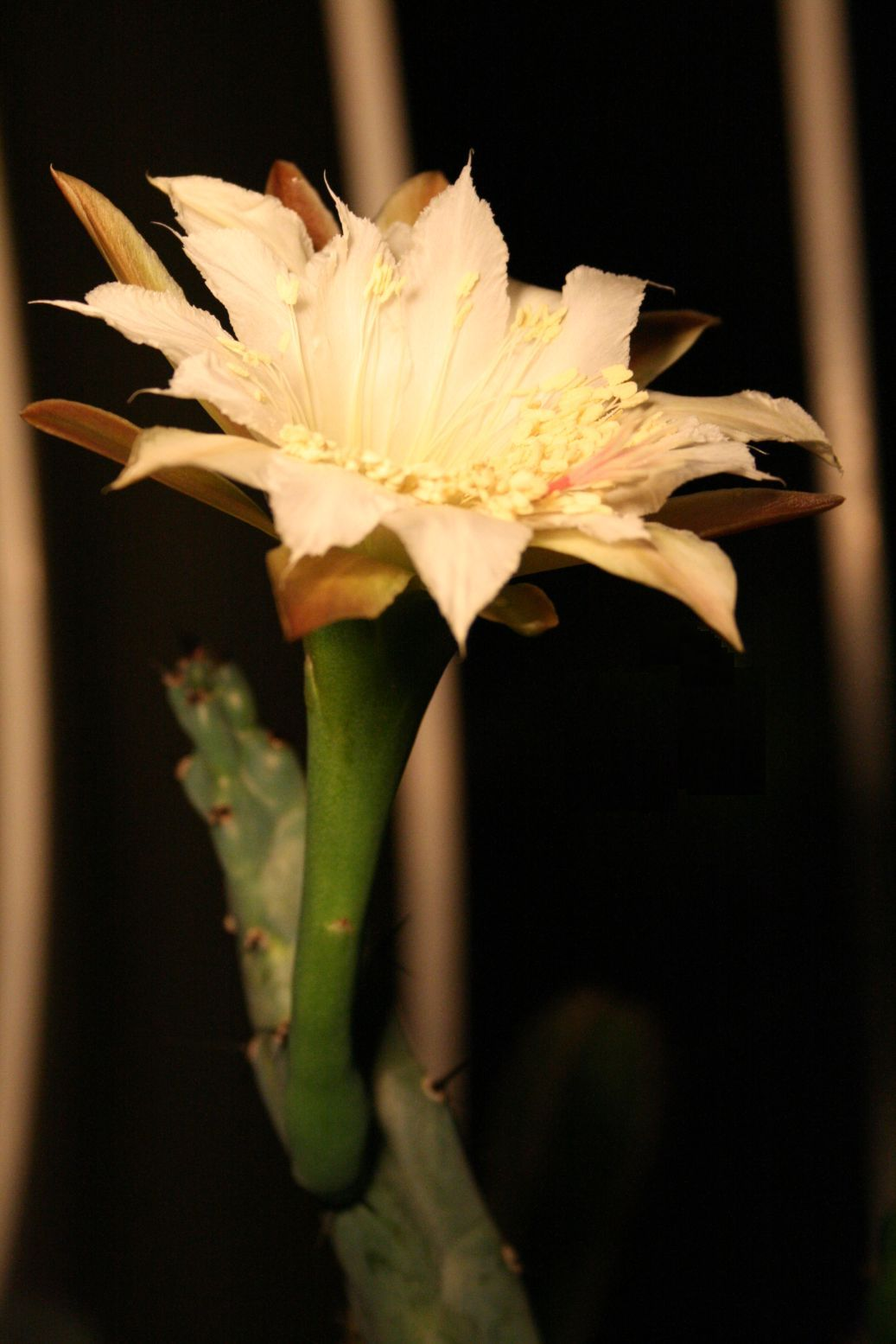 Cereus spegazzinii (Cereeae; Cactaceae; Planta) virágzó hajtása